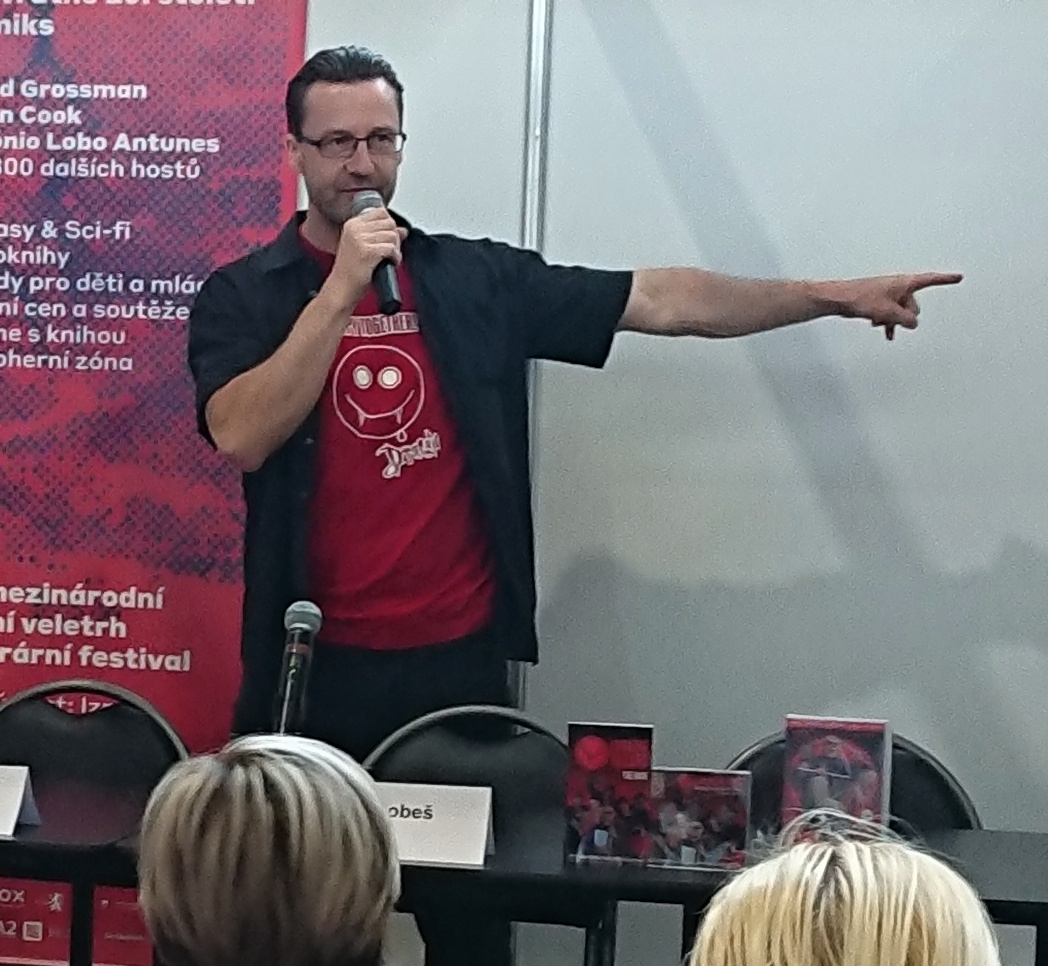 Marek Dobeš na veletrhu Svět knihy 2018